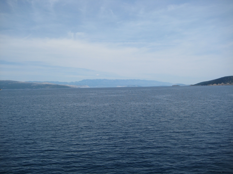 Srednja vrata, Croatia